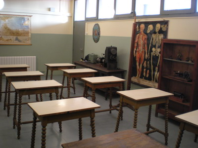 IES